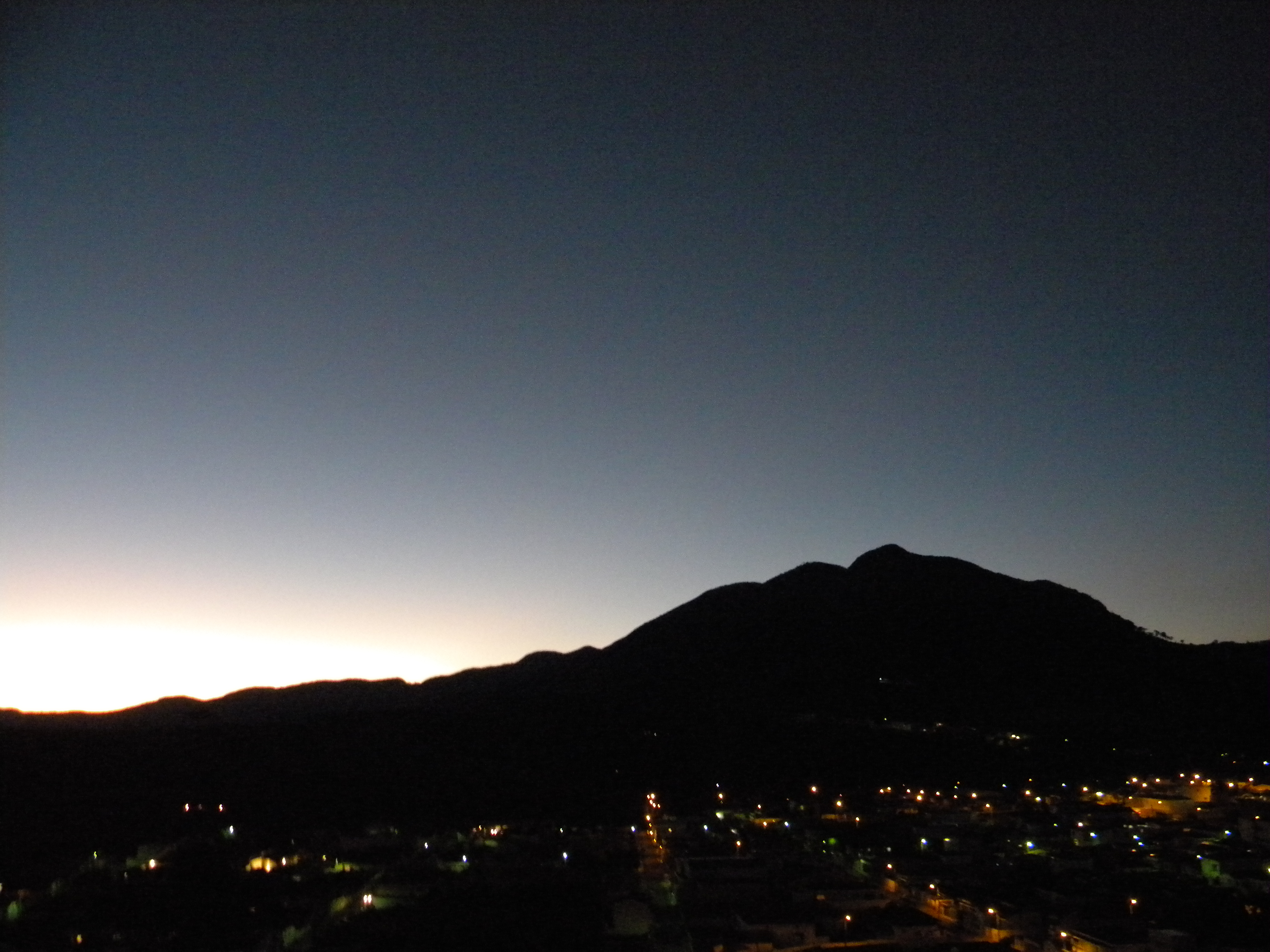 Vista parcial de Andradas